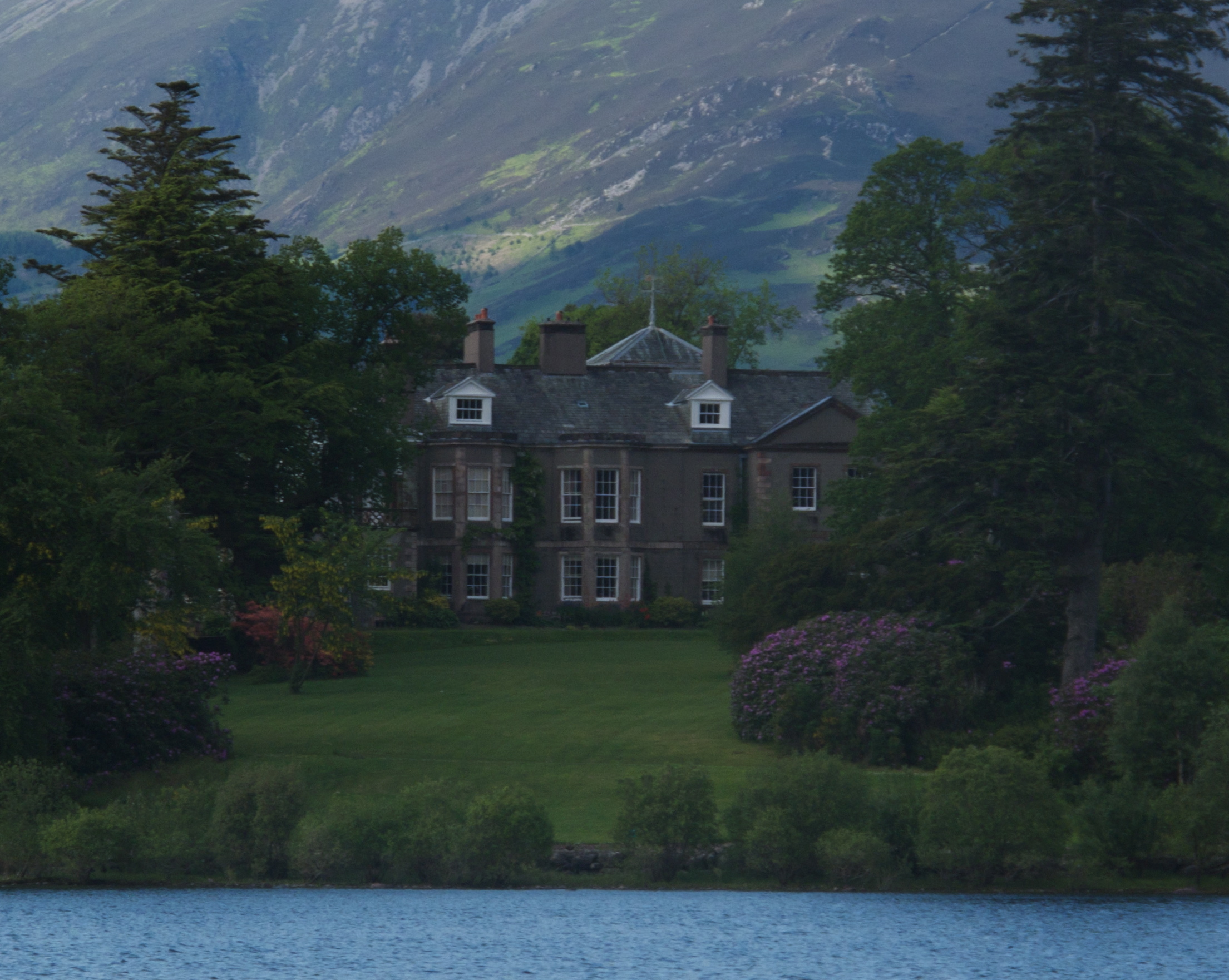 Derwent Island House